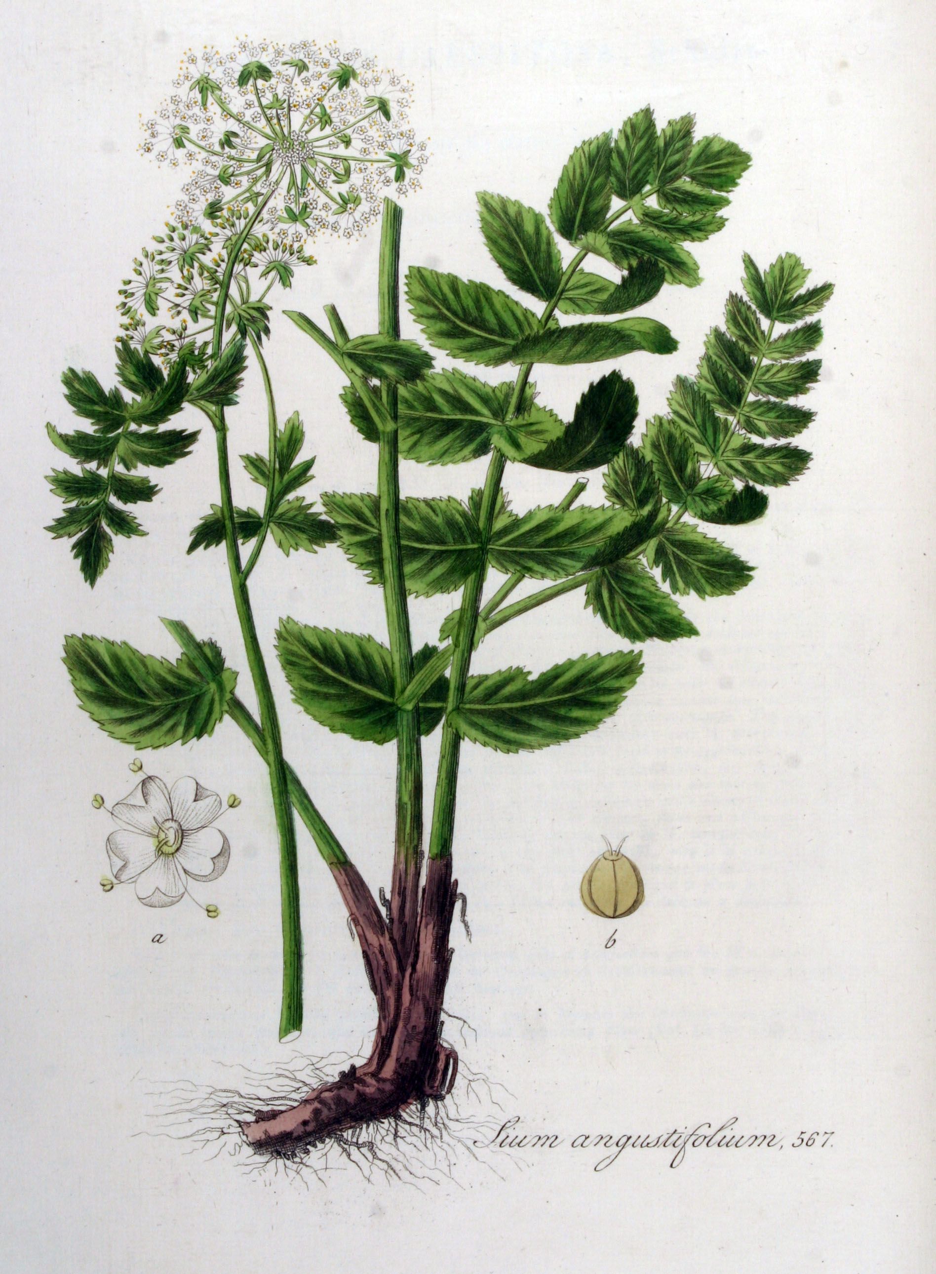 Berula erecta (Huds.) Coville (Syn. Sium angustifolium L.)